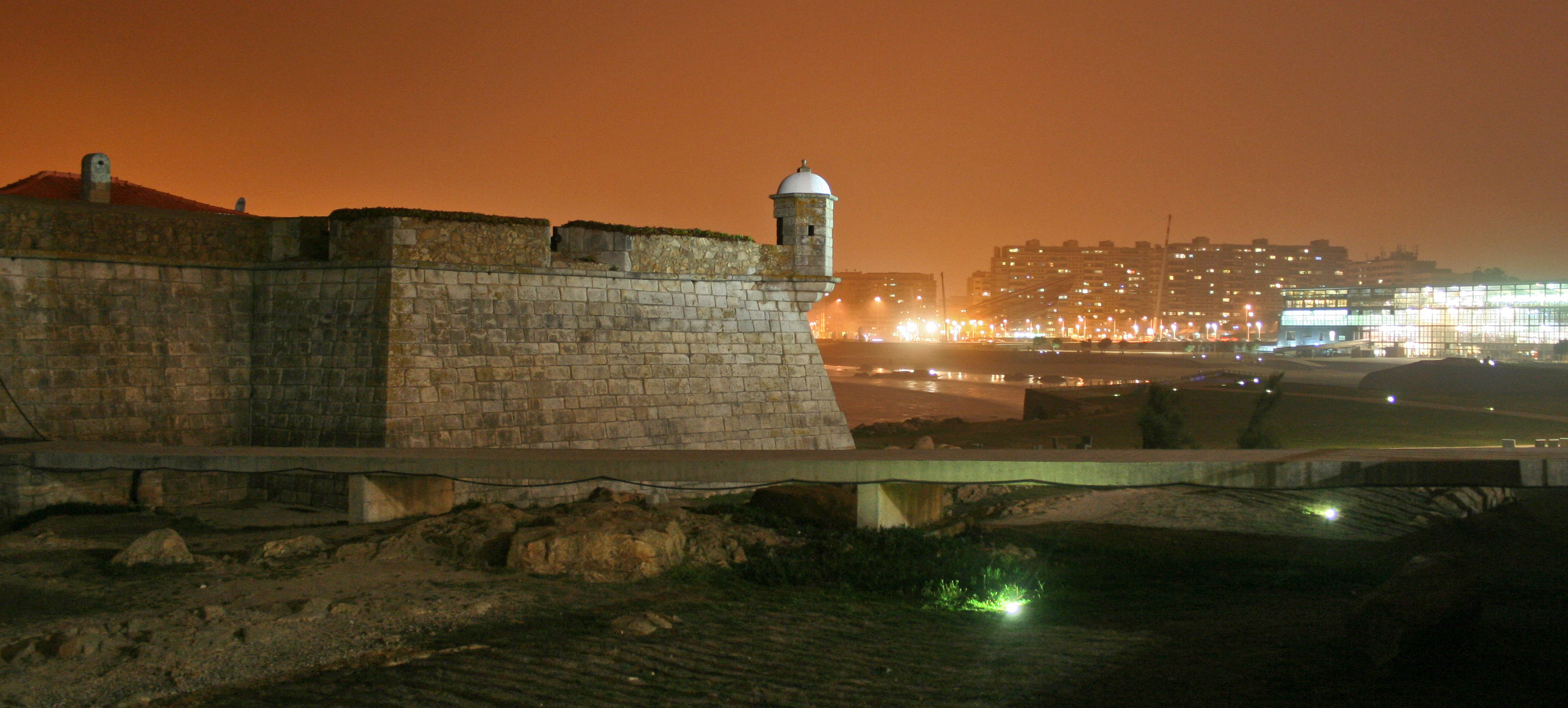 Castelo do Queijo ou Fortaleza do Queijo This file was uploaded for Wiki Loves Monuments in Portugal with the unique identifier 74496.